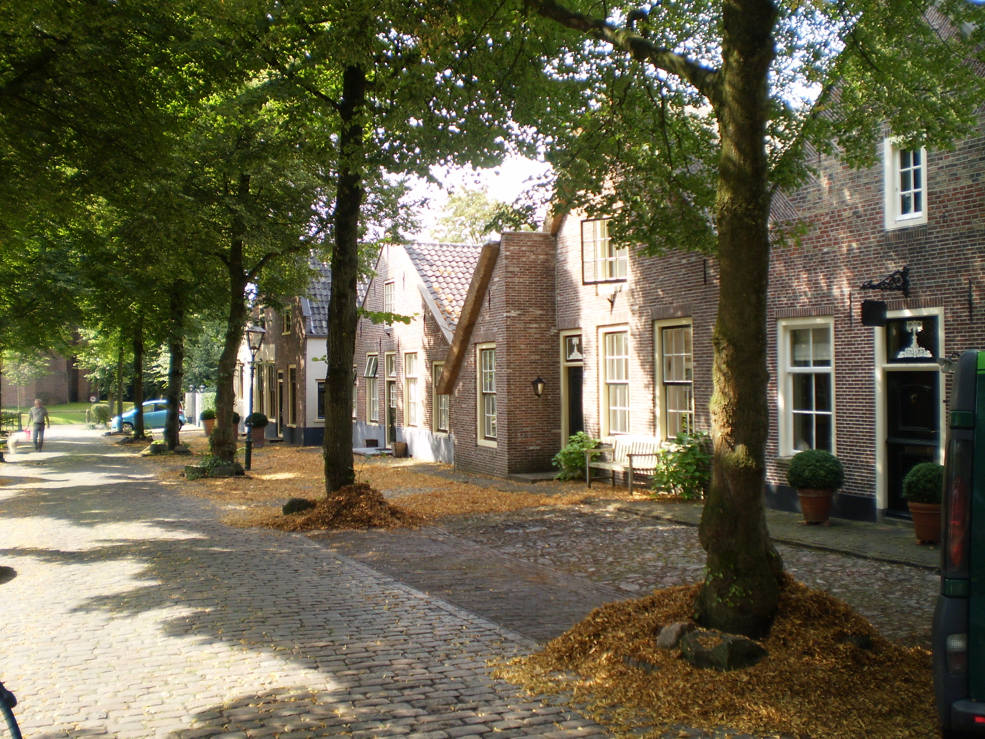 Alde buorren Iemnes.